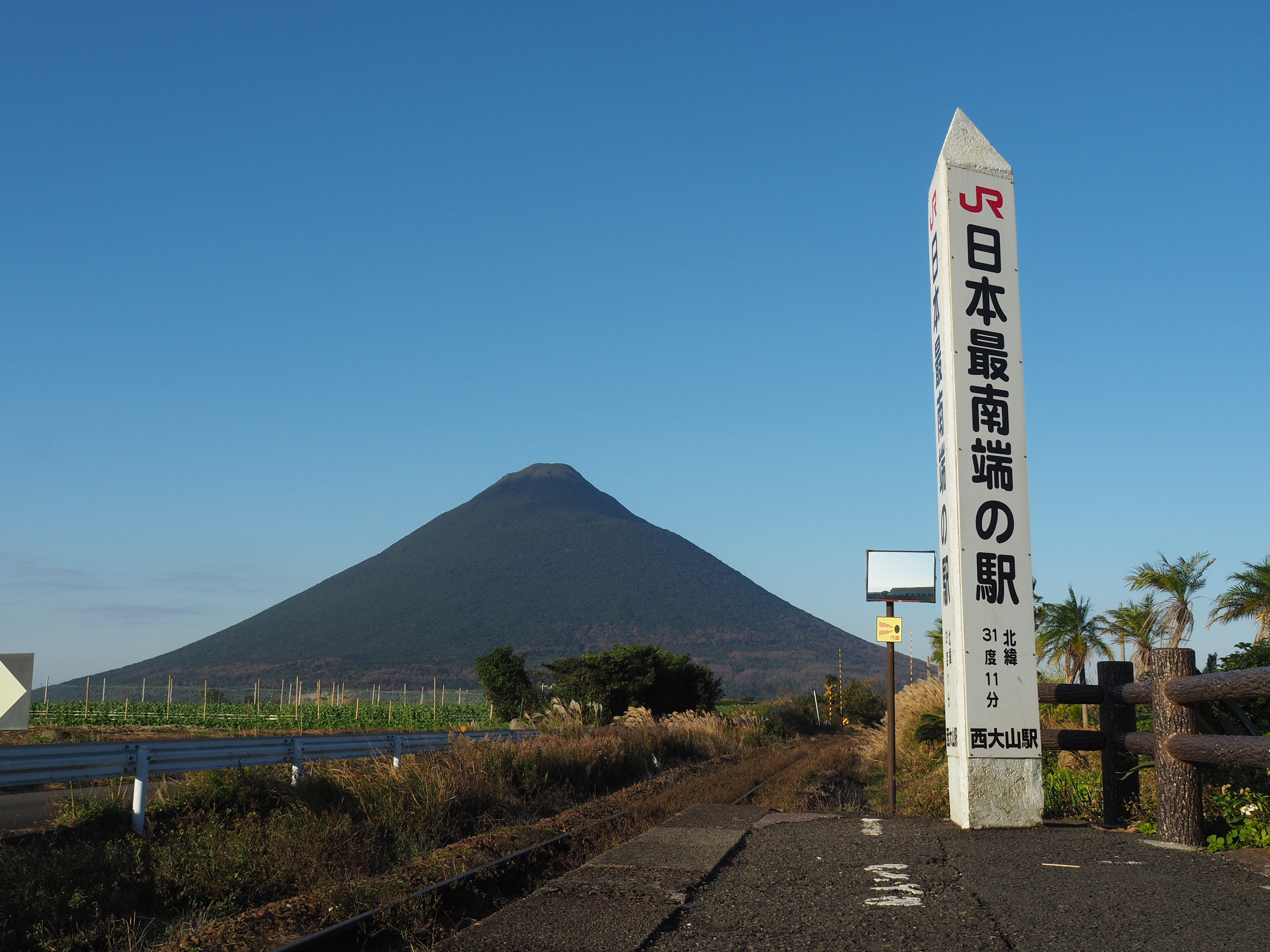 開聞岳とJR最南端の駅の碑